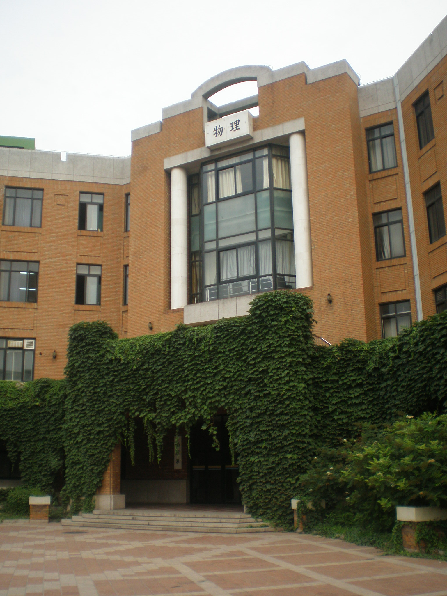 中文（中国大陆）: 清华大学物理楼